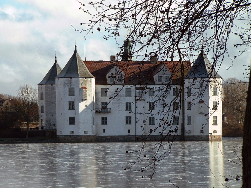 Schloss Gluecksburg